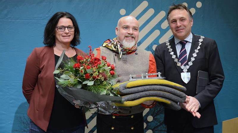 Leder i hovedutvalg kultur, May Britt Lagesen, prisvinner Jon Fredrik Skauge og fylkesordfører Tore O. Sandvik